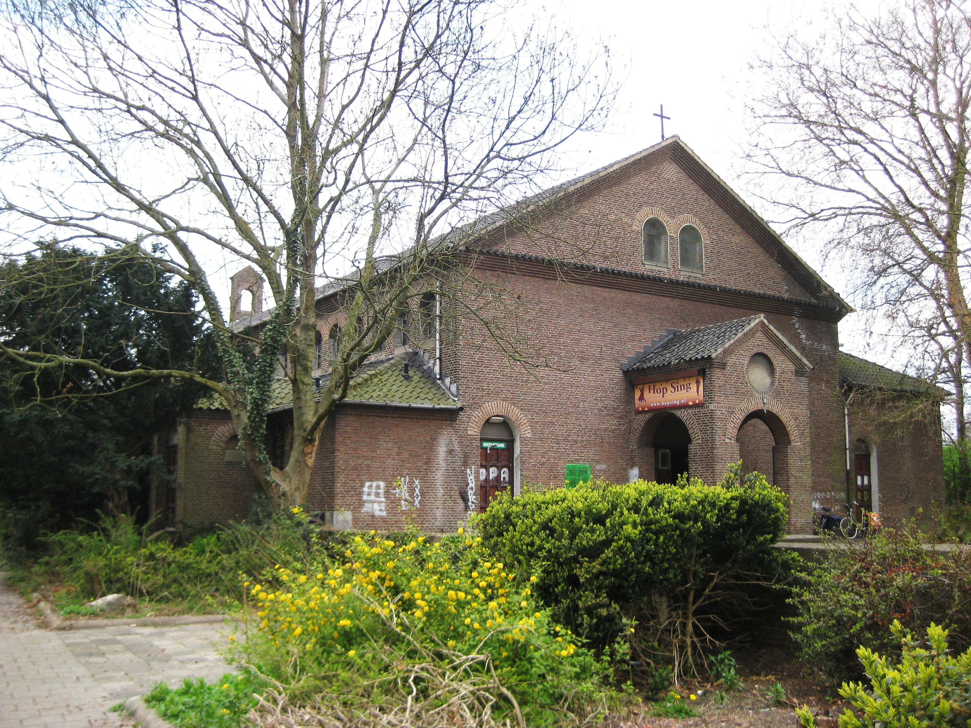 Kometensingel 150, Amsterdam-Noord (Tuindorp Oostzaan)